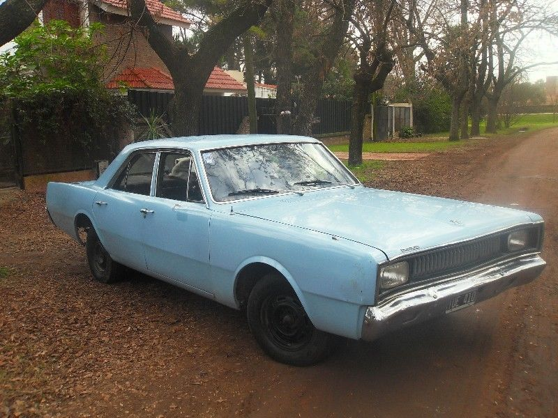 dodge polara 77